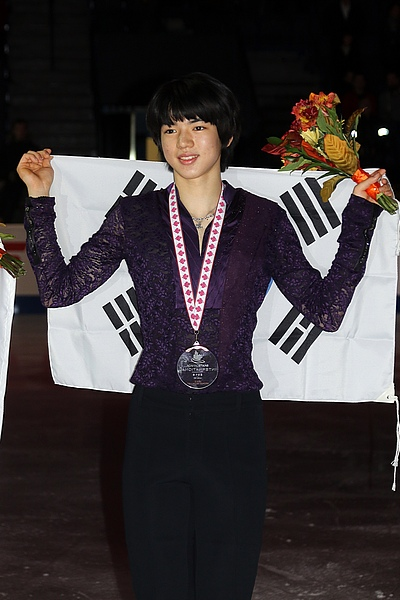 2018 Skate Canada International